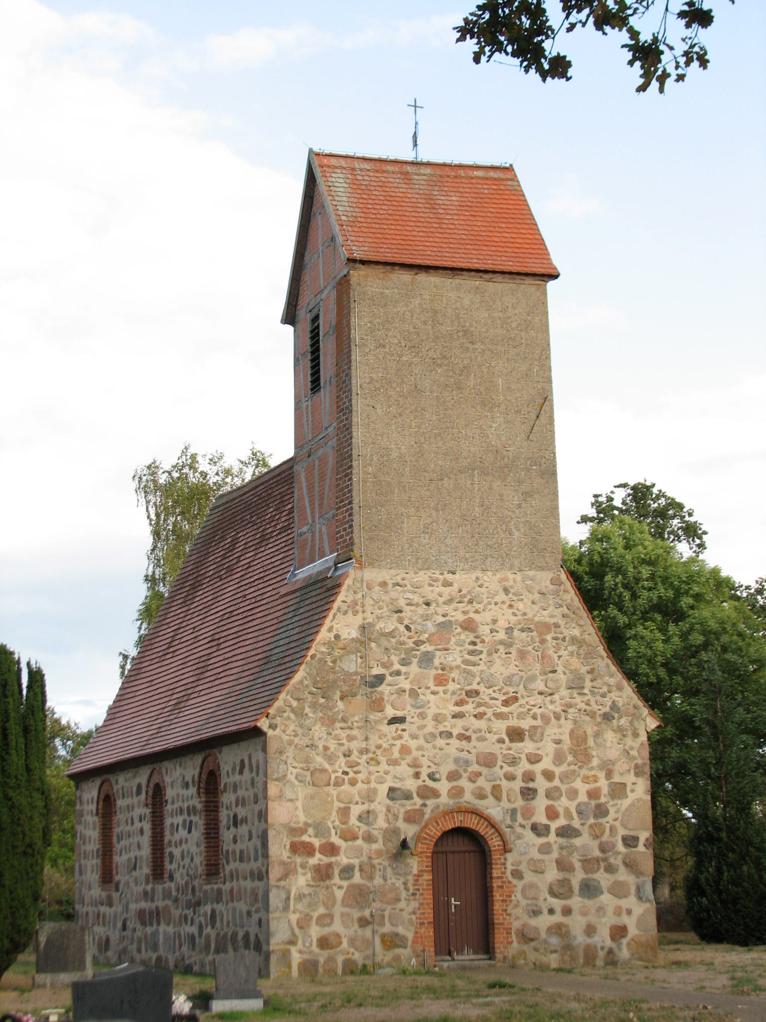 Kirche zu Beese (2018)